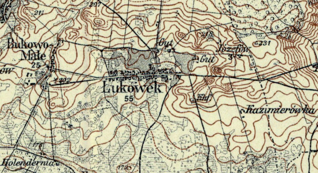 Łukówek (pow. chełmski) na mapie Rosji Zachodniej (Karte des westlichen Rußlands) z 1915 r.